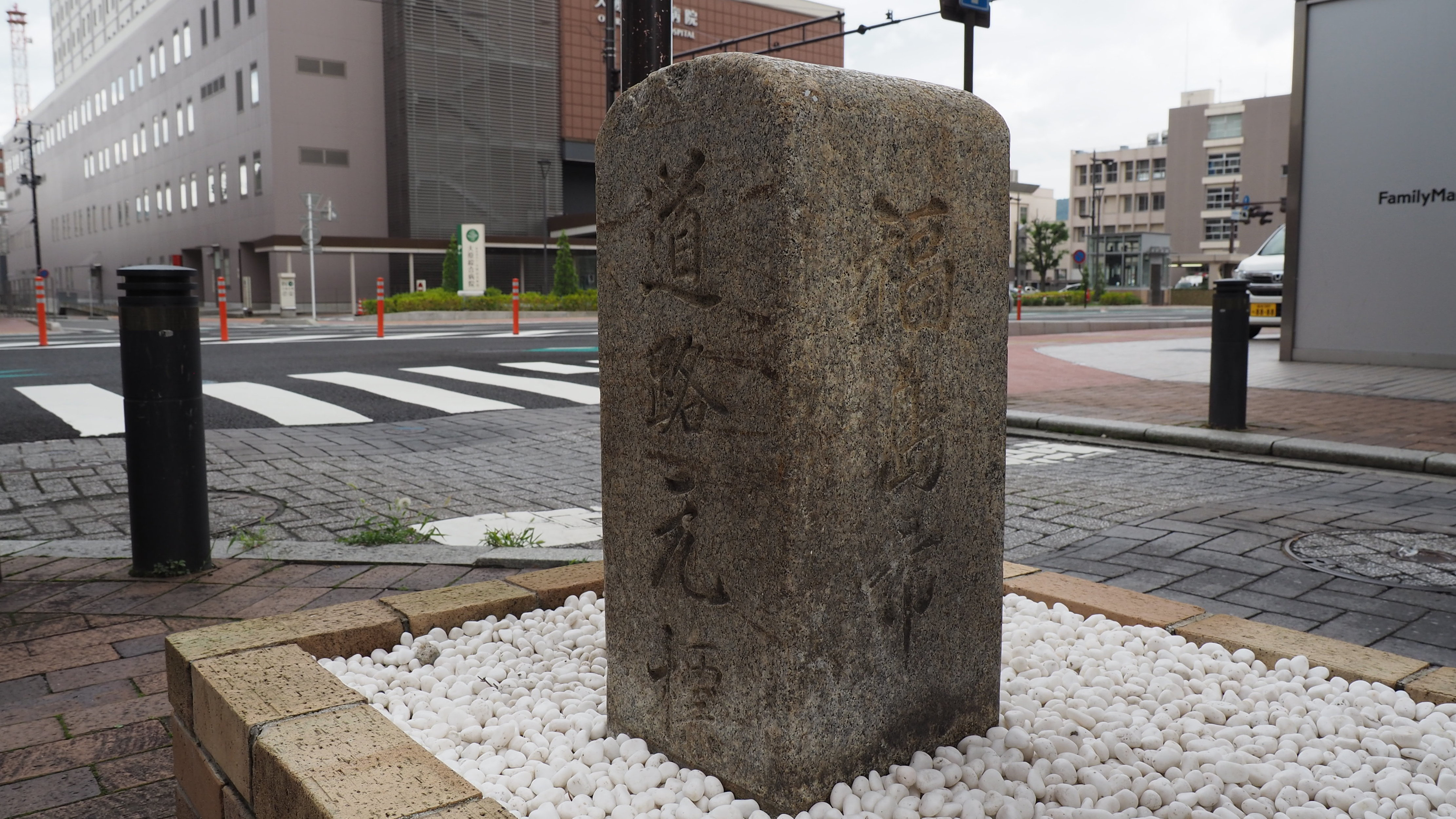 1919年(大正8年)の道路法令により設置された石柱。この石柱は当初の位置よりも西側に移され、元の位置には路面に直径約10cmの赤い標石が埋め込まれている。2020年8月撮影。